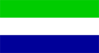 Summary Drapeau de la principauté de Baramba Source Nataraja Statut Nataraja Catégorie:Drapeau de principauté des Indes